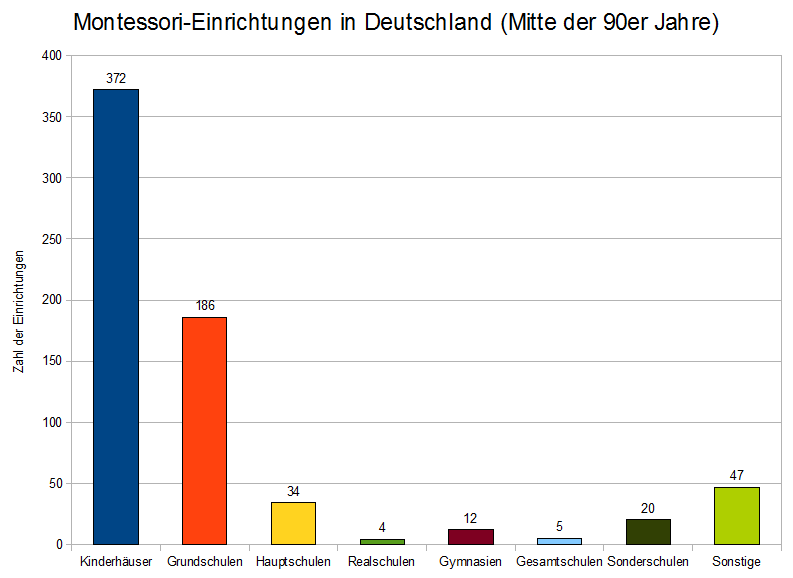 Zahl der Montessori-Einrichtungen in der Bundesrepublik Deutschland Mitte der 1990er Jahre. Zahlenangaben nach Hebenstreit 1999, S. 215, zitiert nach Hedderich ²2005, S. 102.